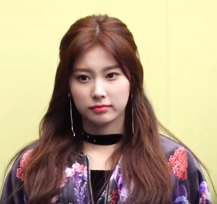 '아이즈원' 김민주, 강혜원, 이채연과 미야와키 사쿠라가 16일 오후 서울 중구 을지로 동대문디자인플라자(DDP)에서 열린 ‘빅팍 서울 패션위크 S/S 2020 컬렉션’에 참석했다.